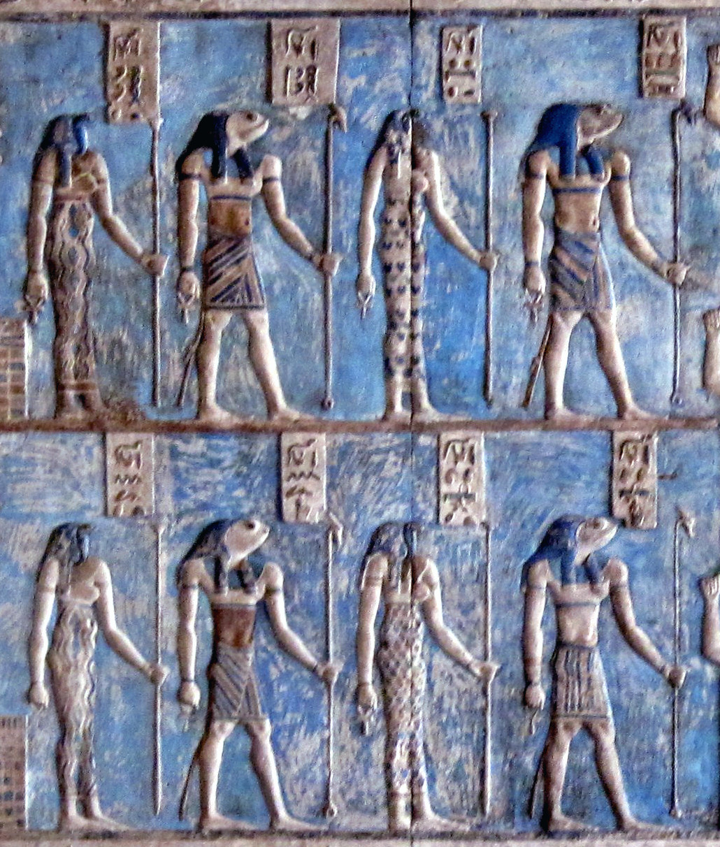 Deckenrelief im Tempel von Dendera, Ägypten